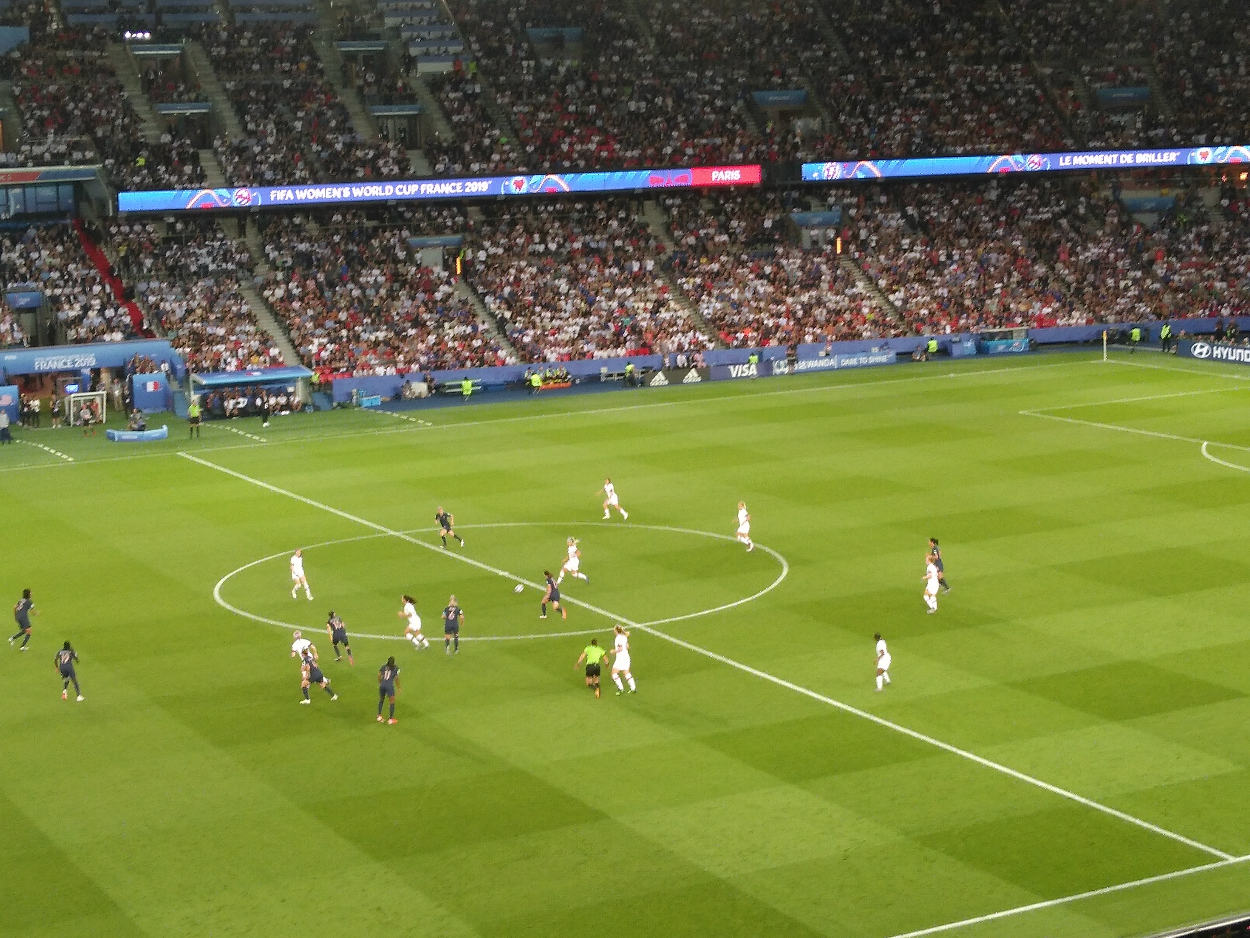 Quart de finale France vs USA au Parc des Princes le 28 juin 2019